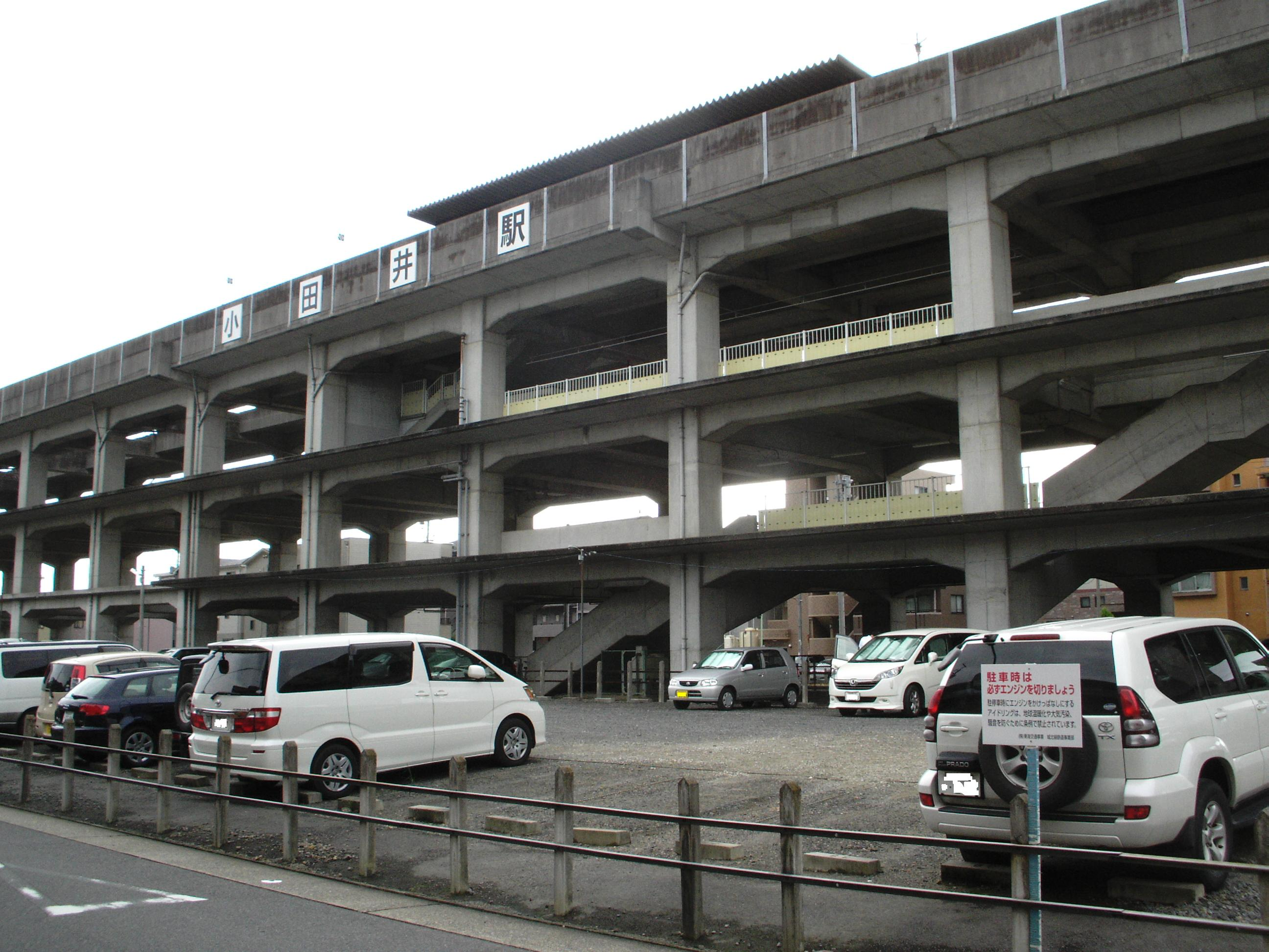 東海交通事業城北線小田井駅